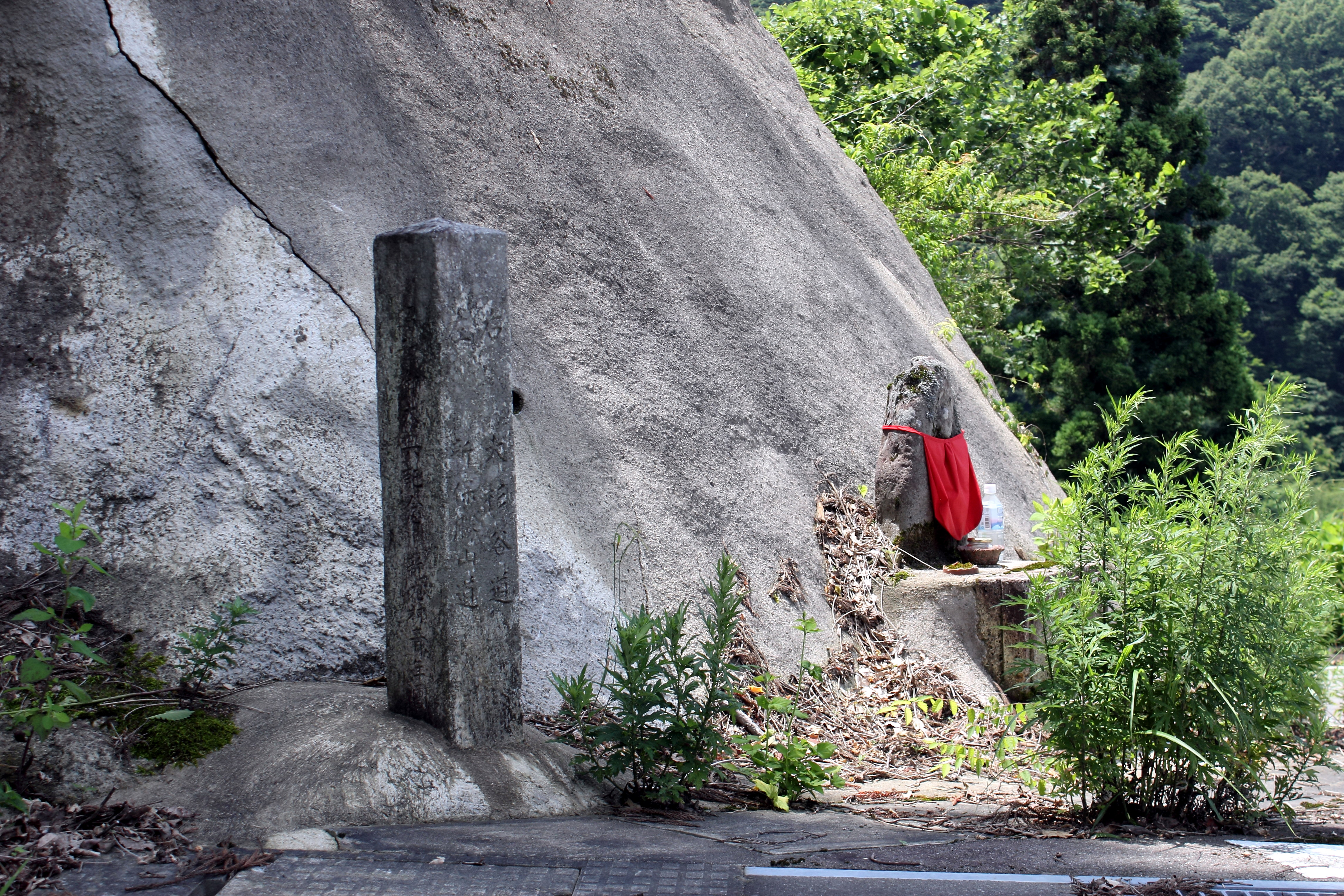 牛ヶ首峠にある道標とお地蔵さん。道標の表示「右 大杉谷道、左 新保勝山道」